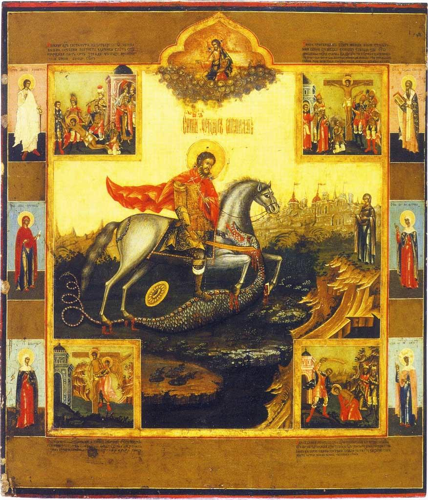 Икона Святой Феодор Стратилат со сценами страдания и святыми на полях. Гуслицы. Третья четверть XIX в. Дерево, левкас, темпера. 53,4х46,8 см. Из Покровского собора на Рогожском кладбище В центре — скачущий на коне св. Феодор Стратилат в броне и красном плаще, поражающий мечом змея, который кусает коня в грудь. Справа — стоящая на крутой горе Евсевия, которая наблюдает поединок. Вдали силуэт города Ираклия. Вверху в облаках Спас Вседержитель. В углах средника квадратные клейма: 1. Мучения св. Феодора жилами; 2. Мучения св. Феодора на кресте; 3. Ангел снимает святого с креста и оживляет его; 4. Усекновение главы святого. На полях изображены Ангел-хранитель, Анна пророчица, вмц. Феодосия (слева); Иаков, брат Господень, мцц. Матрона и Ирина (справа).